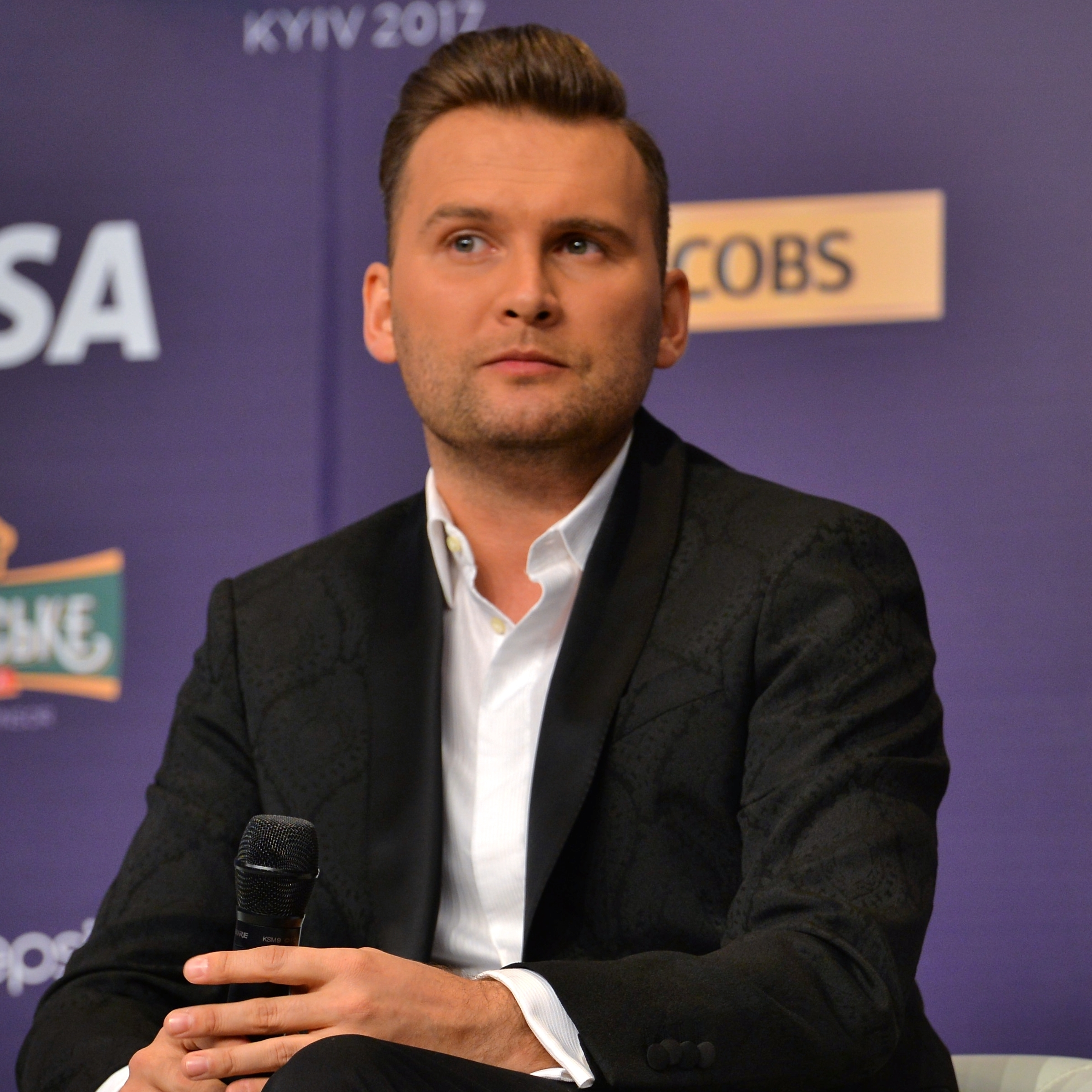 Естонські співаки Койт Томе і Лаура Пильдвере на прес-конференції пісенного конкурсу Євробачення 2017 у Києві